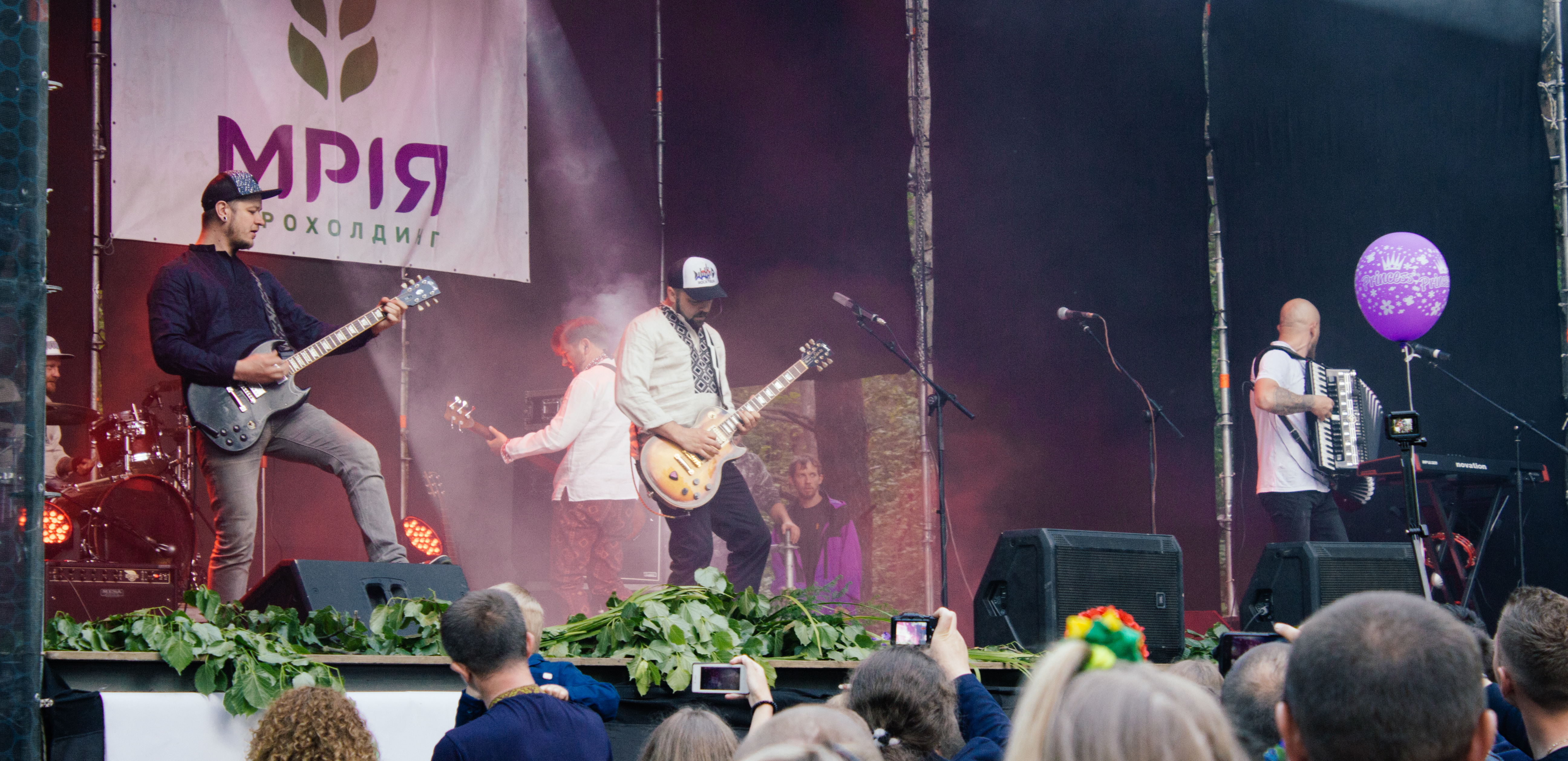 Виступ гурту Мотор'ролла на фестивалі Братина 2017